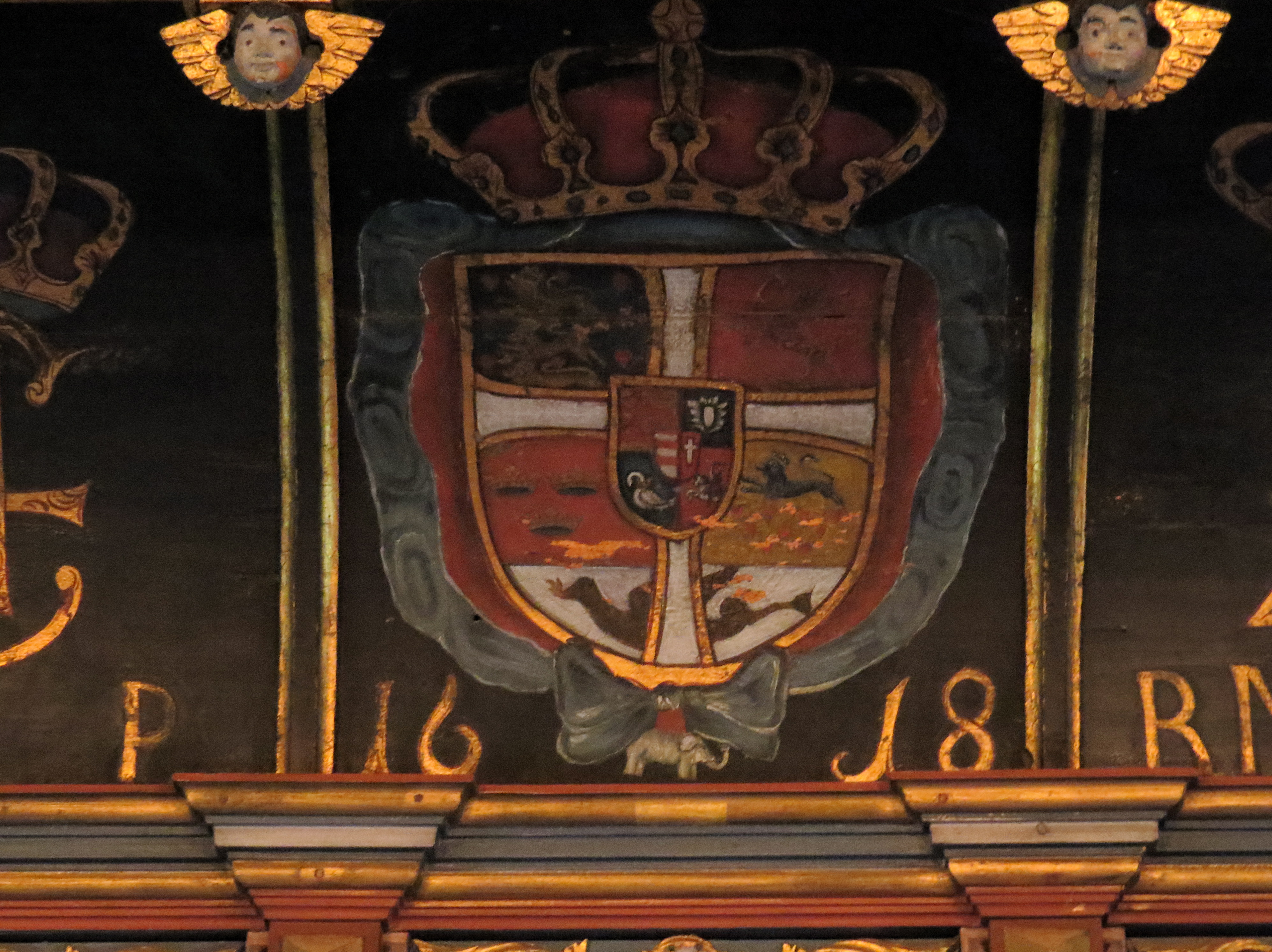 Christian IV af Danmark og Norges kongevåben fra Mælum kirkes altertavle, Mælum, Skien, Telemarken